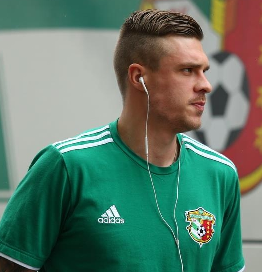 Евгений Будник